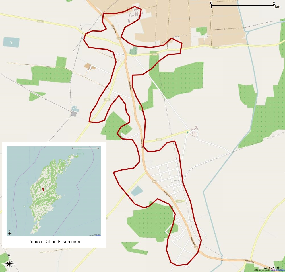 Tätorten Romas gränser 1990 enligt Atlas över rikets indelningar 1992.